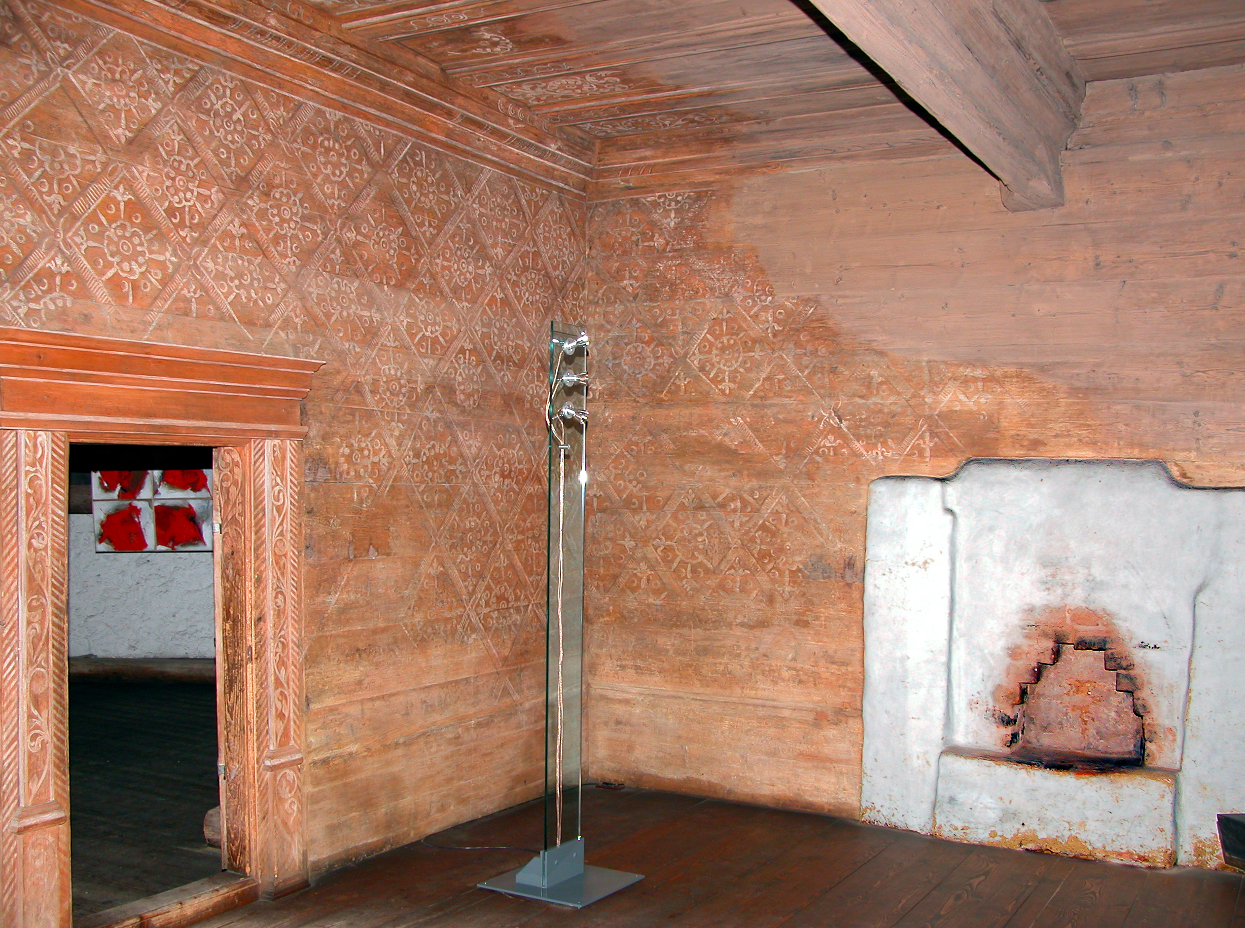 15.10.2007 08115 Schönfels (Gemeinde Lichtentanne): Burg Altschönfels, Museum. Bohlenstube im Obergeschoß mit Renaissancedecke. [DSCN30598.TIF]20071015200DR.JPG(c)Blobelt